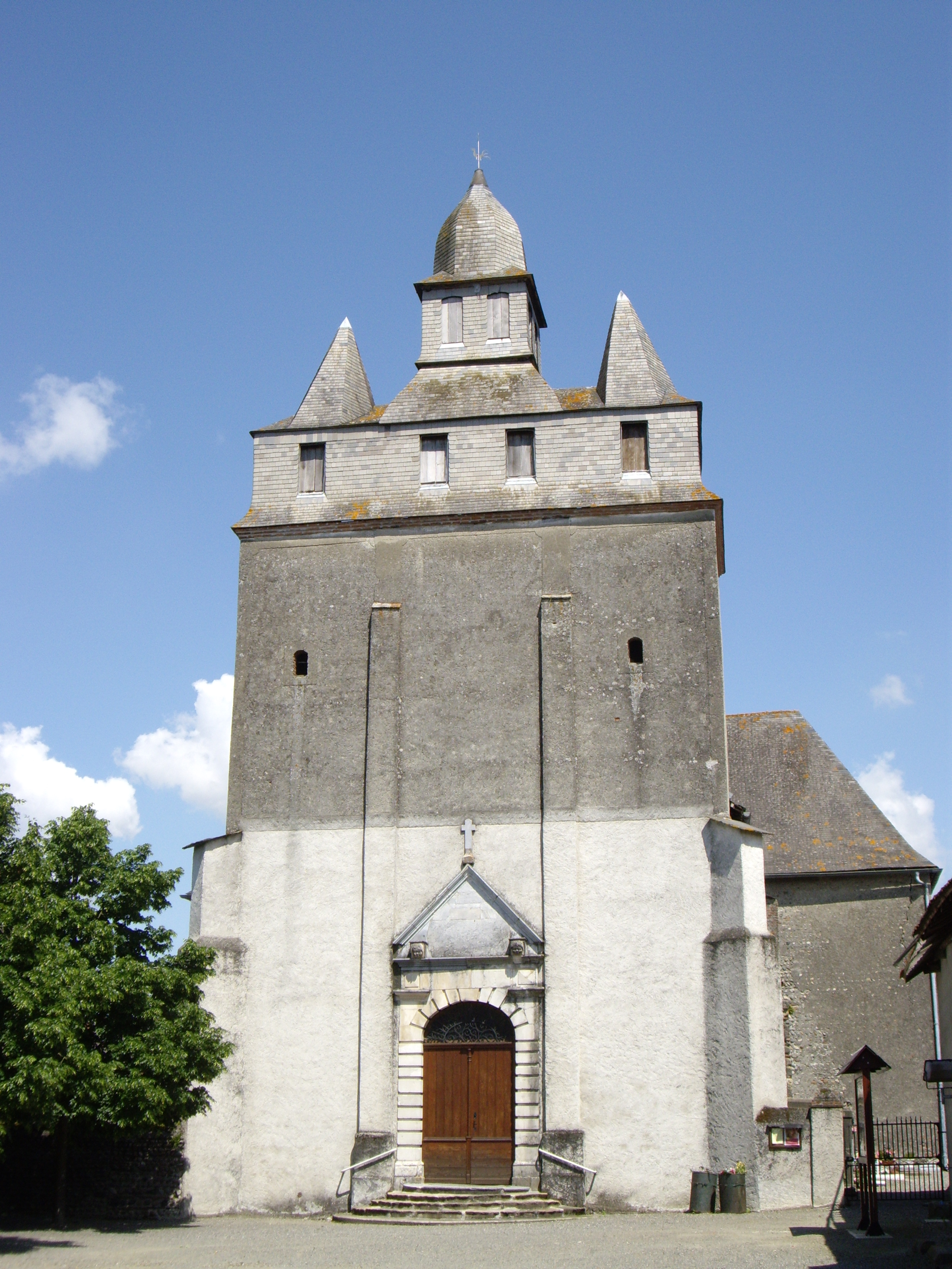 Église Saint-Barthélémy d'Andrest (Hautes-Pyrénées, France)